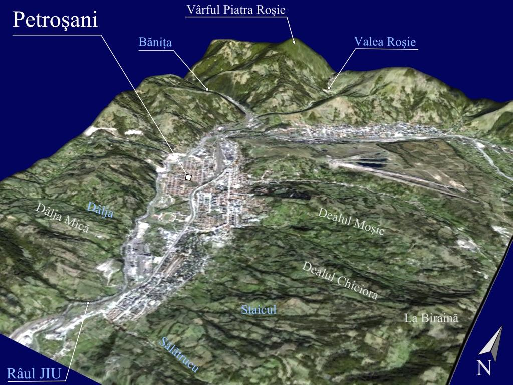 Prelucrare 3D pentru Petroşani - Romania. Imagine realizata cu date SRTM si textura World Imagery.